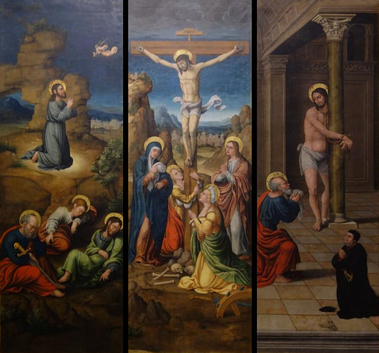 El Tríptico del Calvario conservado en el Museo de Bellas Artes de Córdoba representa tres escenas de la Pasión de Jesucristo, siendo una de ellas la Oración en el Huerto, otra la Crucifixión y la última la flagelación de Cristo.